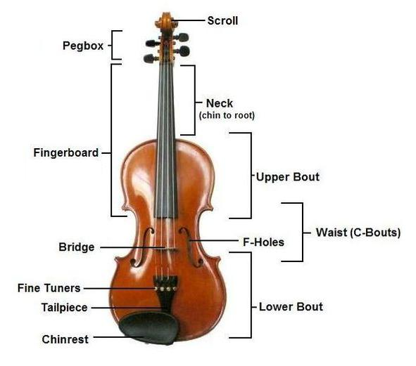 Violins.